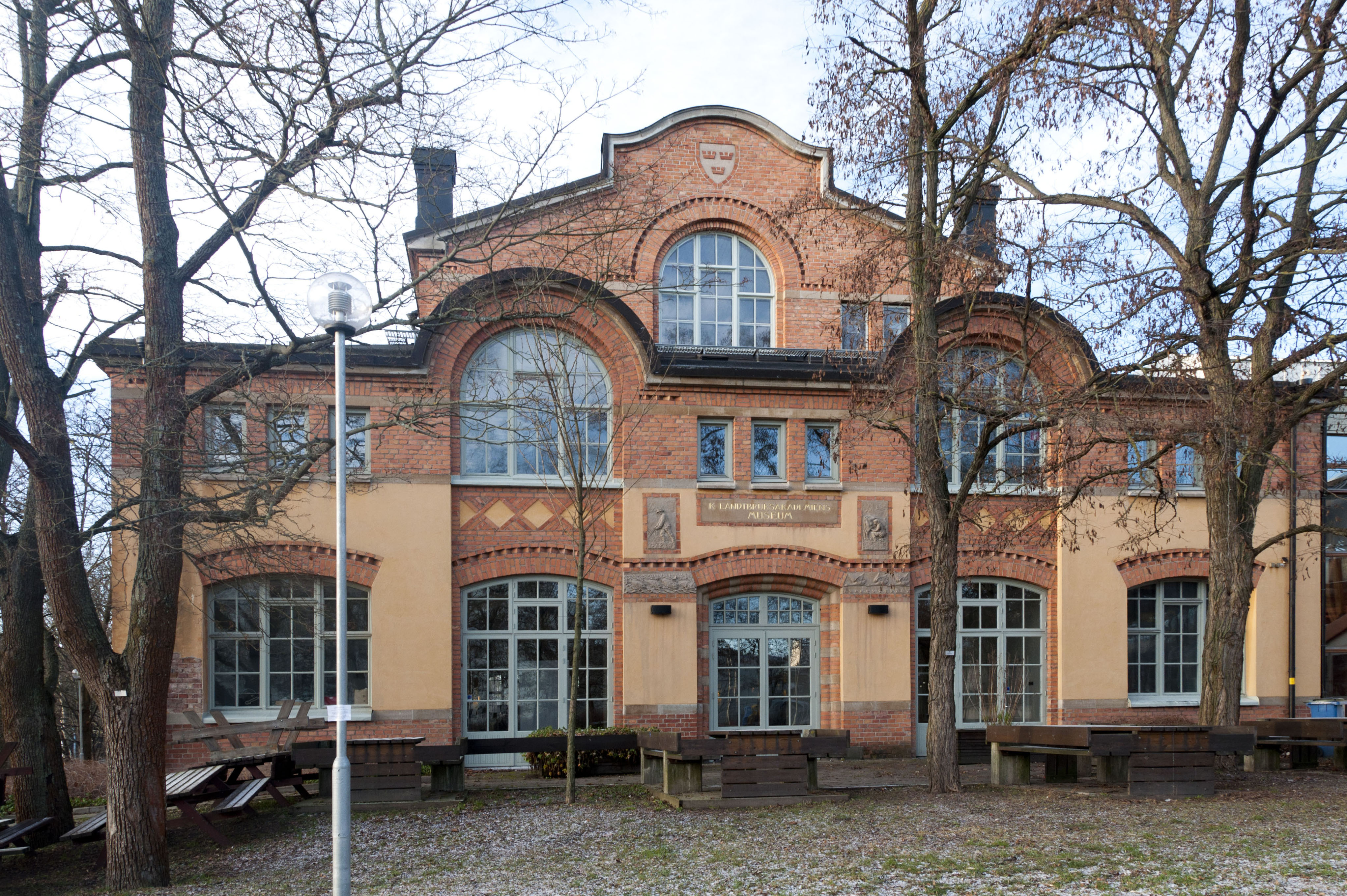 Lantis - Lantbruksakademiens fiskeri- och lantbruksmuseum. Byggnadsår 1907. Arkitekt Erik Josephson